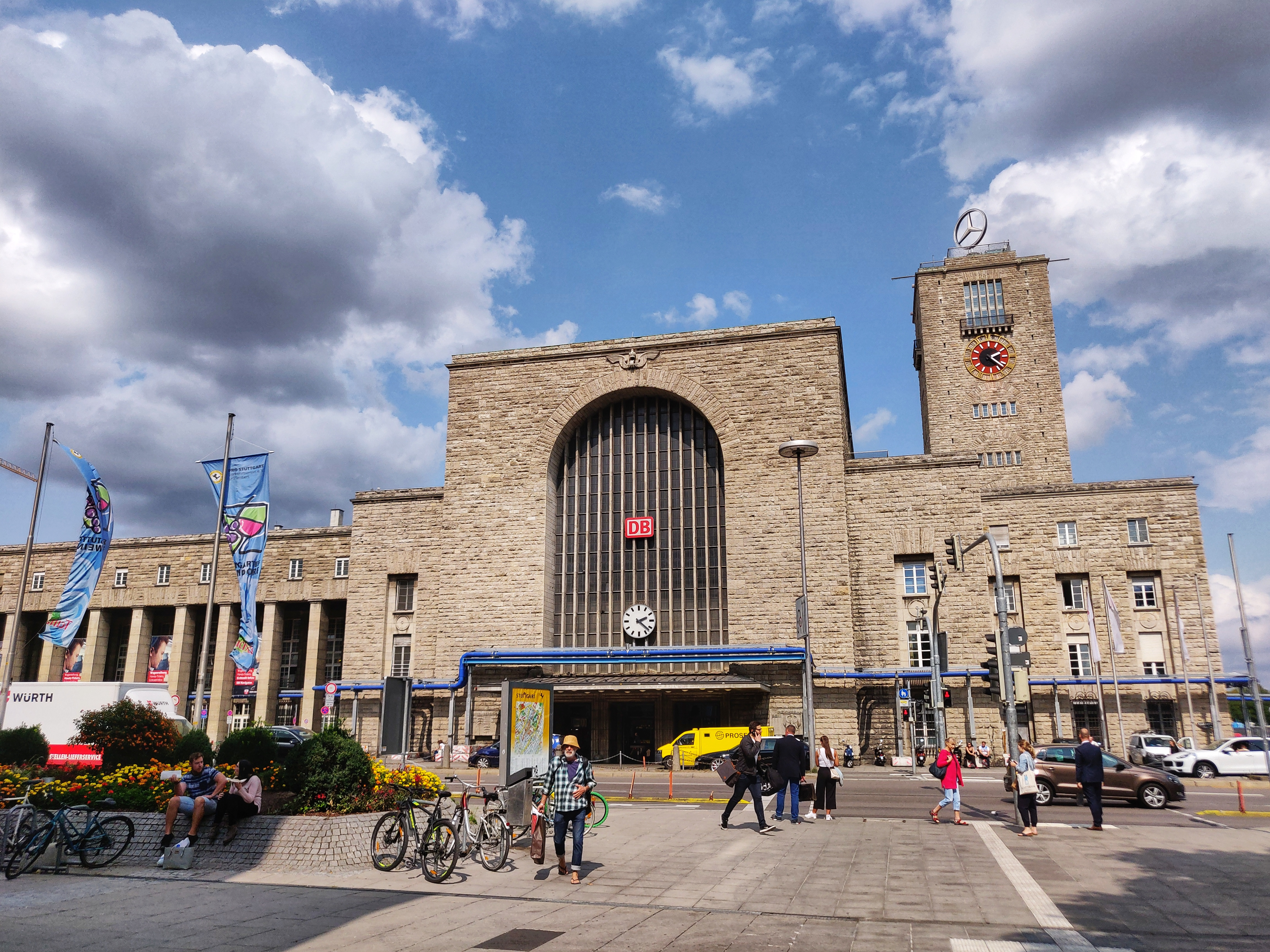 2018-08-30 // EC 218 "Chiemgau" // Salzburg - Stuttgart